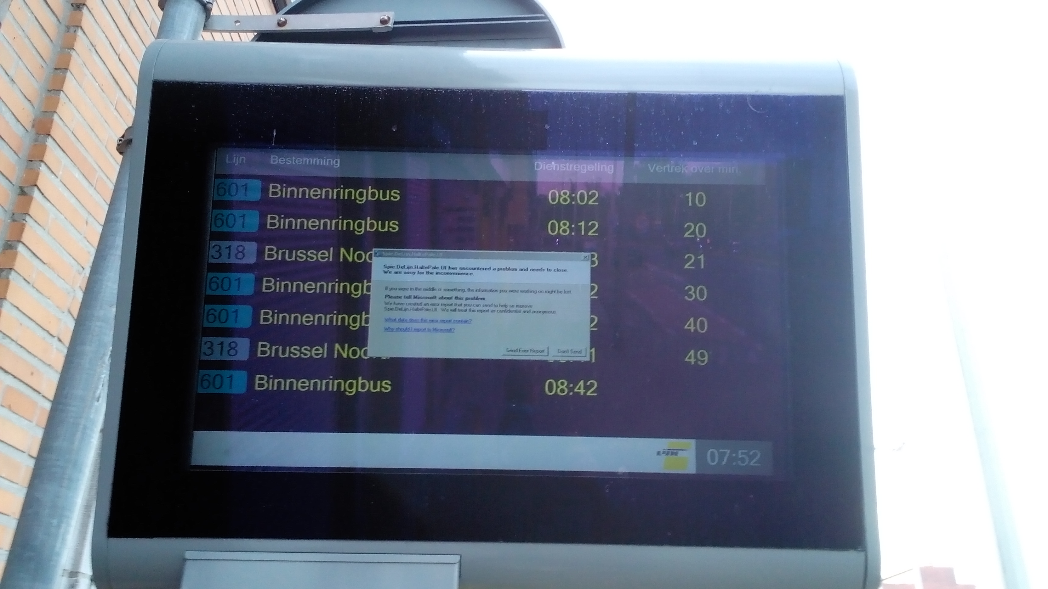 Scherm met real time informatie over De Lijn 601 and 318 aan de Naamsepoort te Leuven met foutmelding, zoals die er al te vaak op staan.